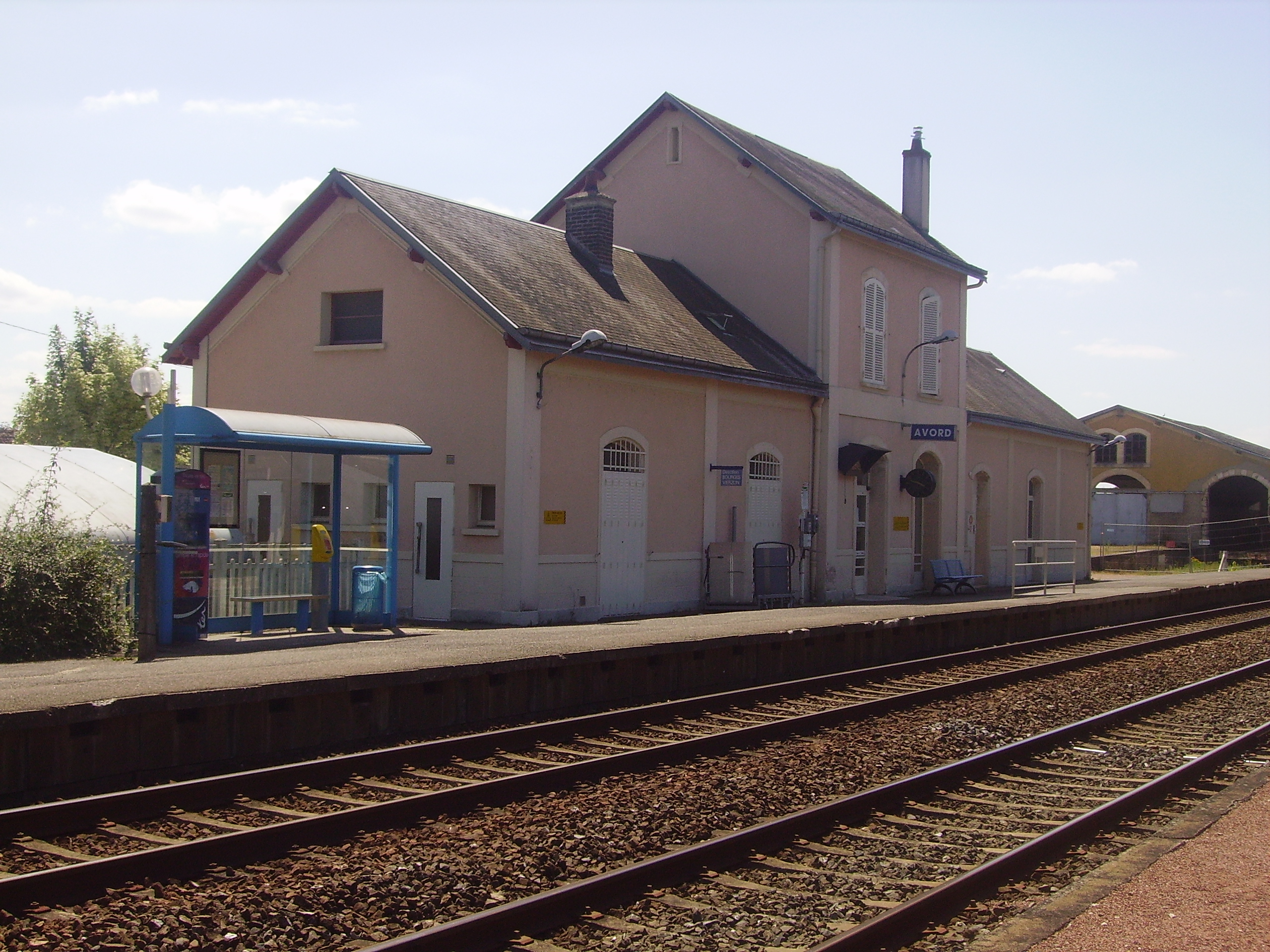 Gare d'Avord (Cher)